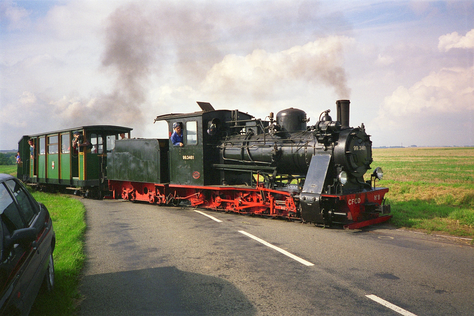 Un train tracté par la 040 N°8 (Vulcan-Werke N°3852 de 1925) du Chemin de fer Froissy-Cappy-Dompierre, se dirige vers Dompierre en franchissant la route départementale 164, le 17 septembre 1995.